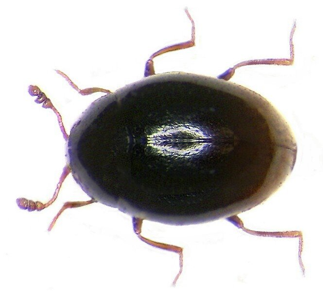 Ephistemus globulus Familie: Cryptophagidae Grösse: 0,8-1,3 mm Verbreitung: Europa, überall häufig Ökologie: an Faulstoffen und im Dünger Fundort: Germania, Bayern, Oberfranken, Selbitz leg.det. U.Schmidt, 2003 Foto: U.Schmidt, 2005